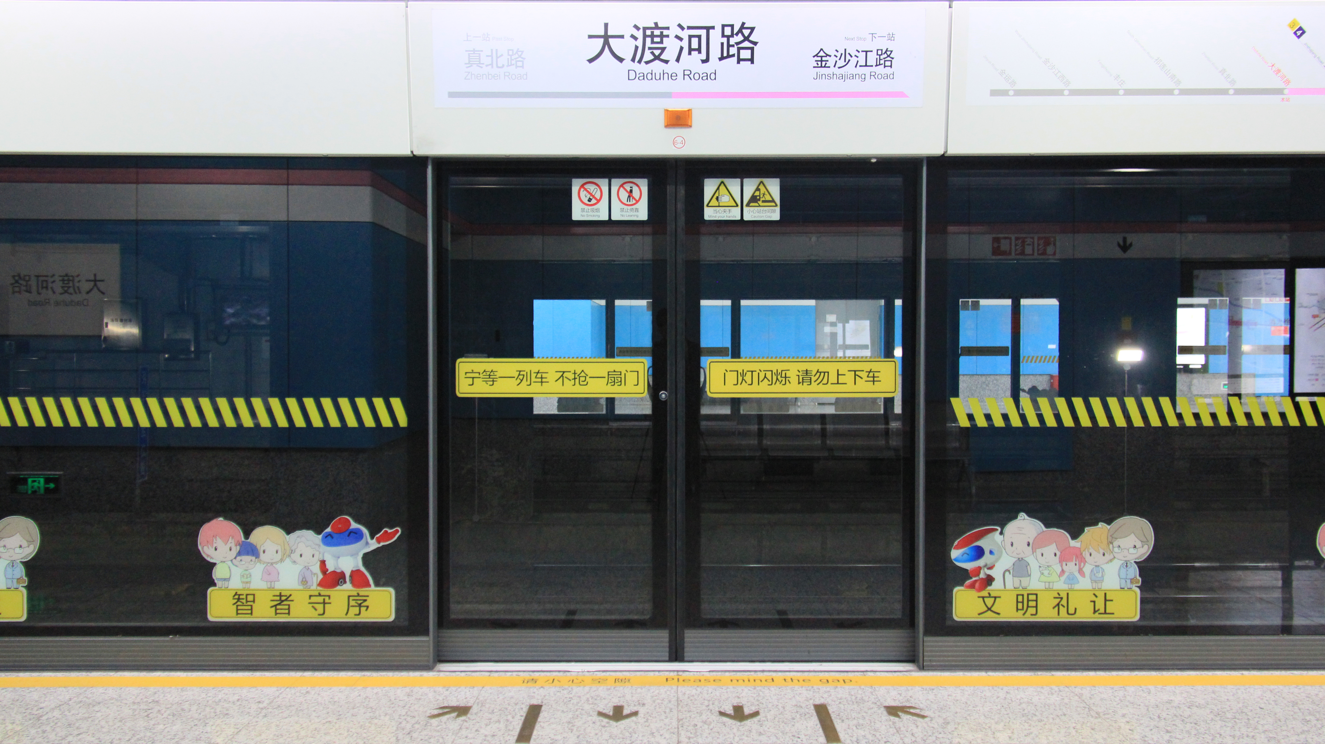 上海地铁13号线大渡河路站屏蔽门，摄于2015年10月2日。